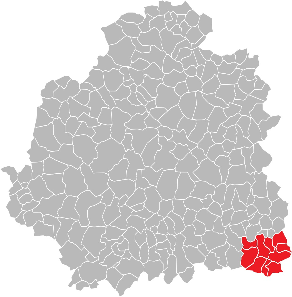 Carte des communes de l'Indre (36) : Le canton de Sainte-Sévère-sur-Indre, de 1790 à 2015.